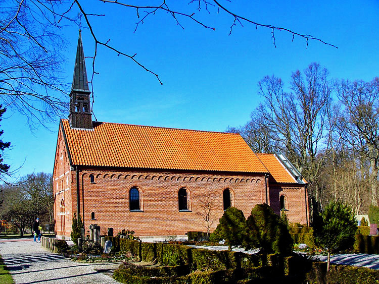 fra sydvest